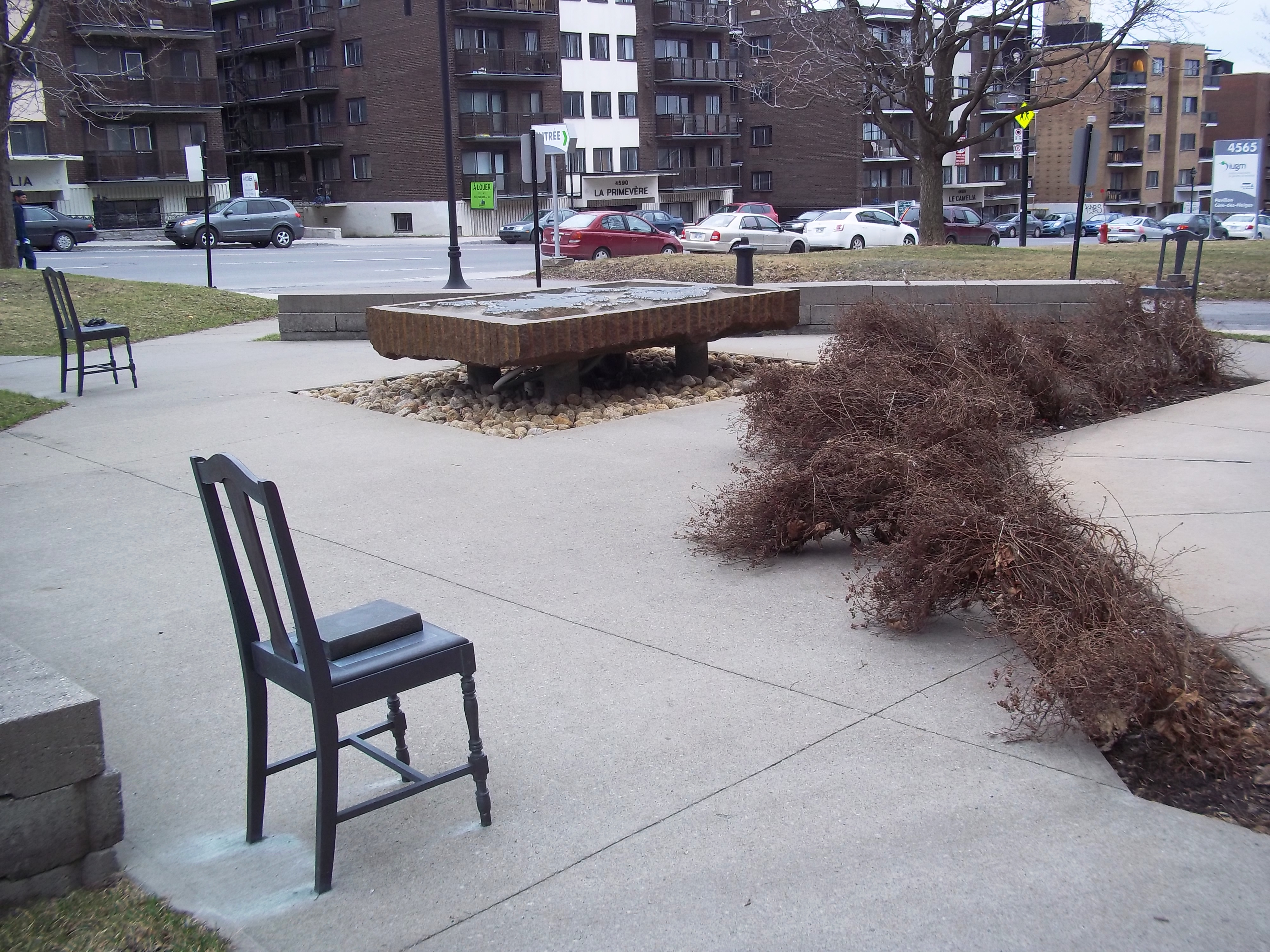 Sculpture de Michel Goulet intitulée Vigies, de 1989. Elle est située devant le Pavillon Côte-des-Neiges de l'Institut universitaire de gériatrie de Montréal, au 4565 chemin Queen-Mary. « Trois sentiers mènent à une carte du monde, symbole de notre milieu de vie, de nos origines et de nos appétits de découvertes. Les voies de la connaissance, de la prévoyance et du travail sont gardées par trois chaises faisant office de vigies; chacune est identifiée par un objet de bronze, énigmes qui interpellent le passant. »